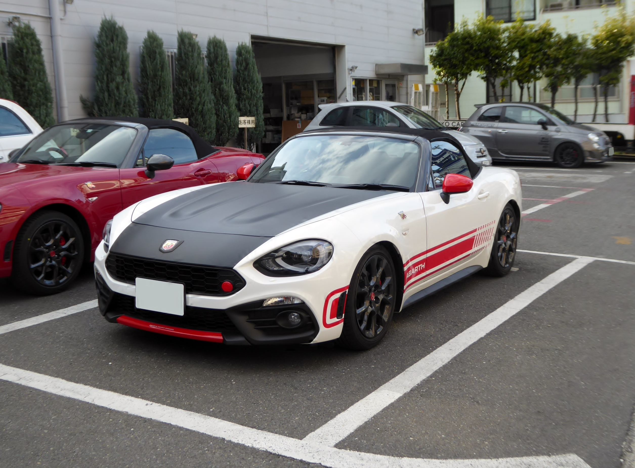 アバルト・124スパイダーのアバルト大阪東デモカー仕様をフロントから撮影。